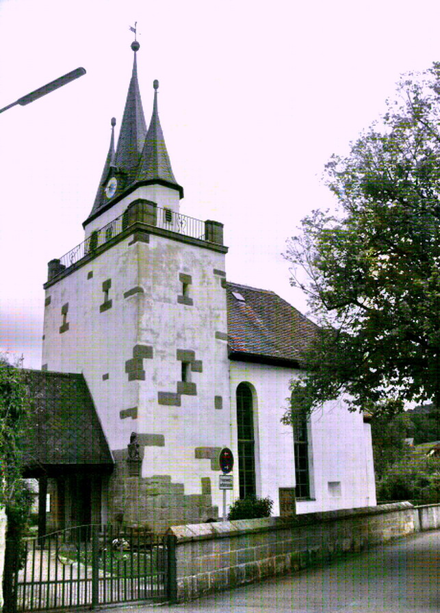 St. Bartholomäus-Kirche in Glashütten (Oberfranken), Denkmal D-4-72-141-1